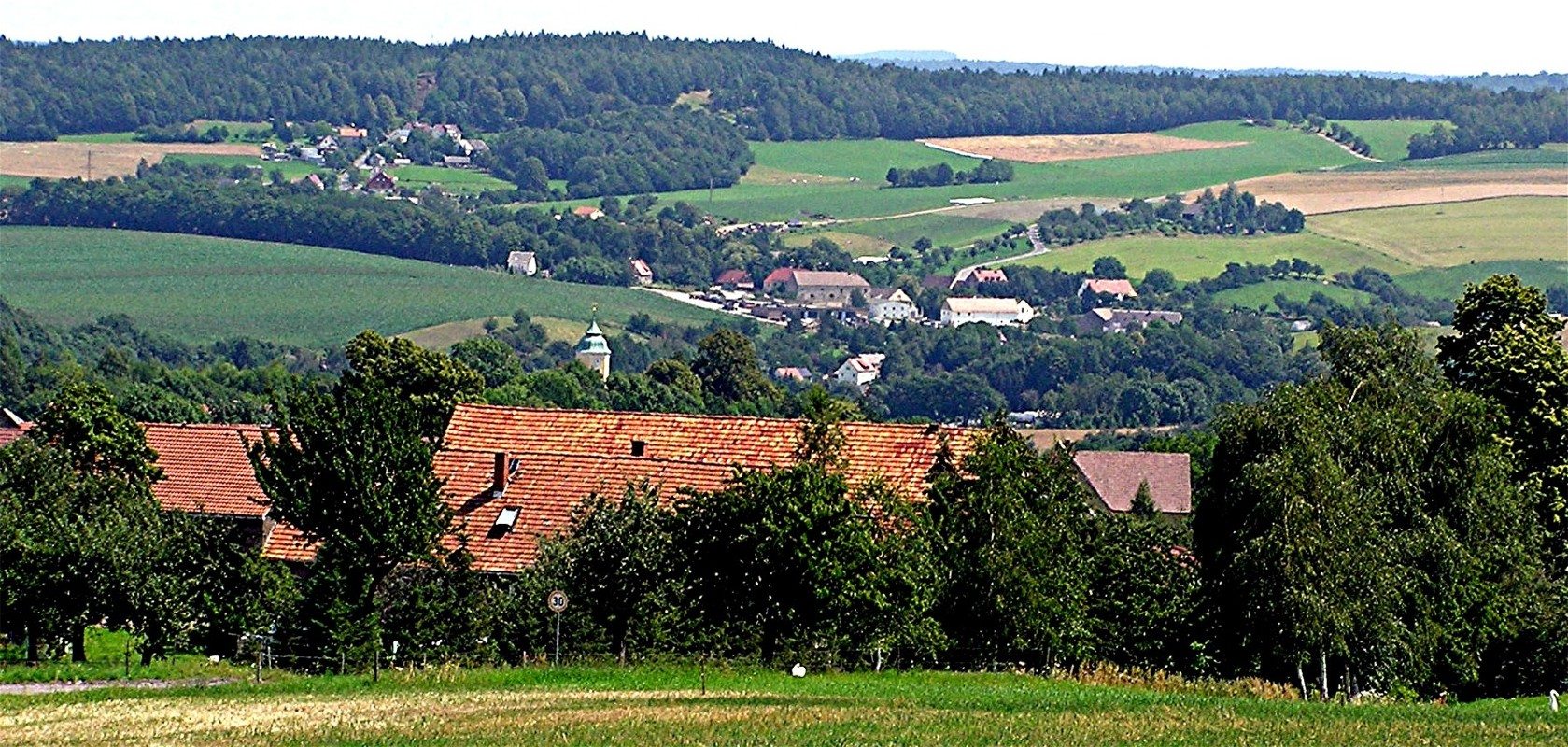 Blick auf Gersdorf (Bahretal)